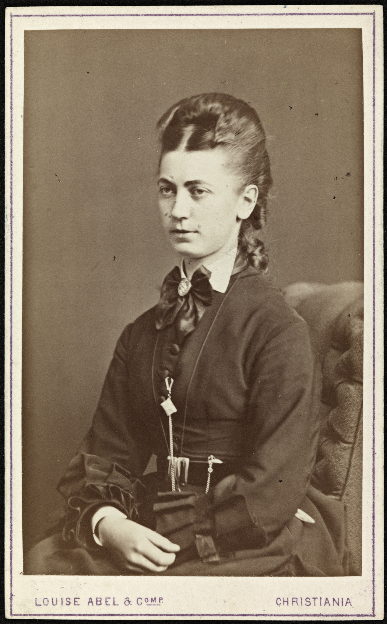 Tittel / Title: Portrett av Agnes Lie (1852-1915) Beskrivelse / Description: Visittkort. Agnes Lie ble i 1901 valgt inn som første kvinne i kommunestyret i Eidsvoll kommune for Venstre. Dato / Date: ukjent / unknown Fotograf / Photographer: Louise Abel & Comp. (Christiania) Eier / Owner Institution: Nasjonalbiblioteket / National Library of Norway Lenke / Link: Bildesignatur / Image Number: blds_05826